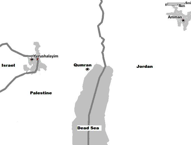 Zelf in Paint getekende kaart.